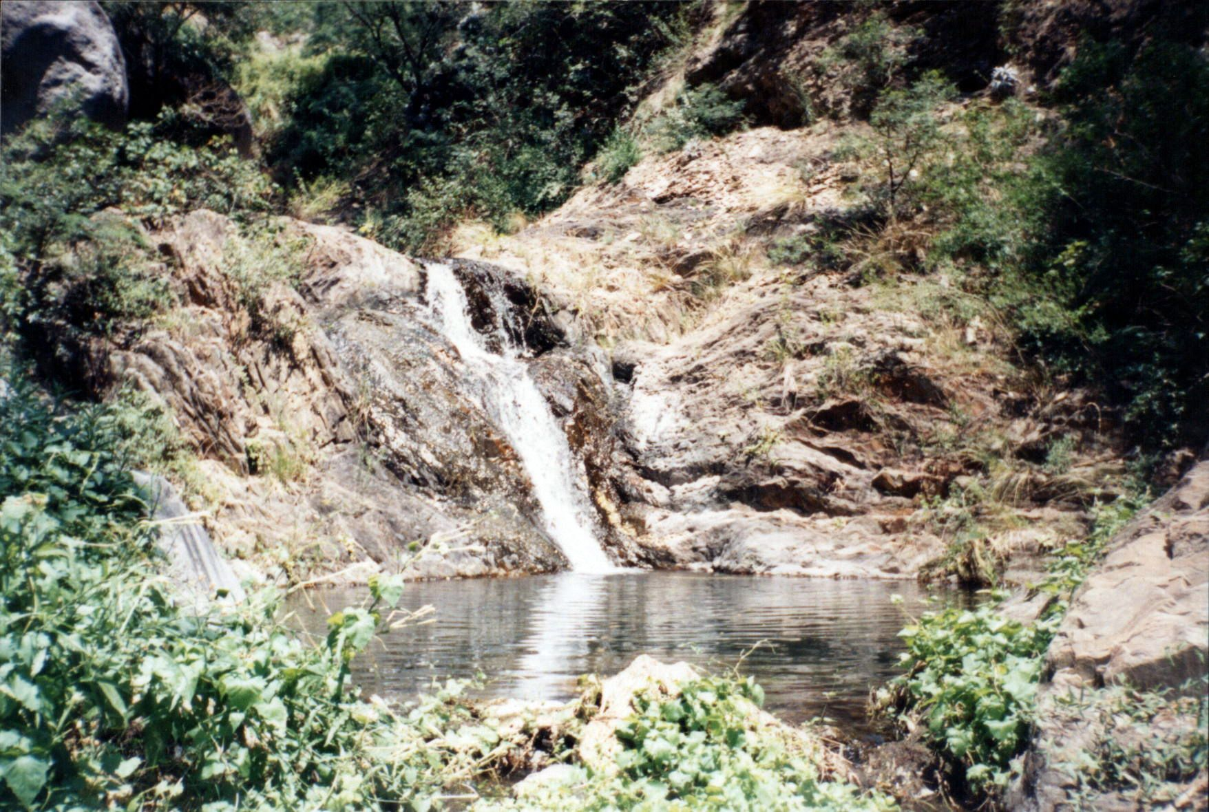 Quebrada del Padre, camino al dique de Olta